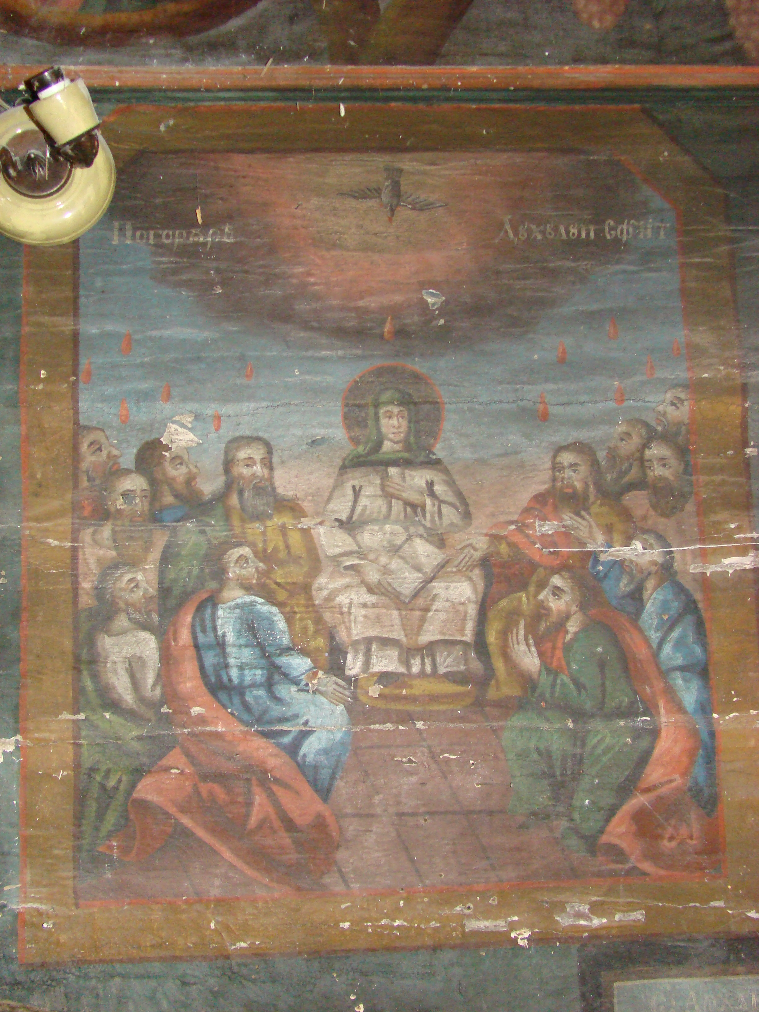 Biserica de lemn „Sfântul Mare Mucenic Gheorghe” din Ionești, județul Arad